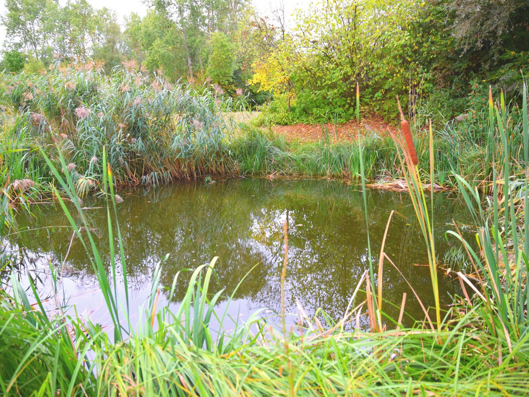 Kleiner Technologieparkteich Frankfurt (Oder)-Markendorf